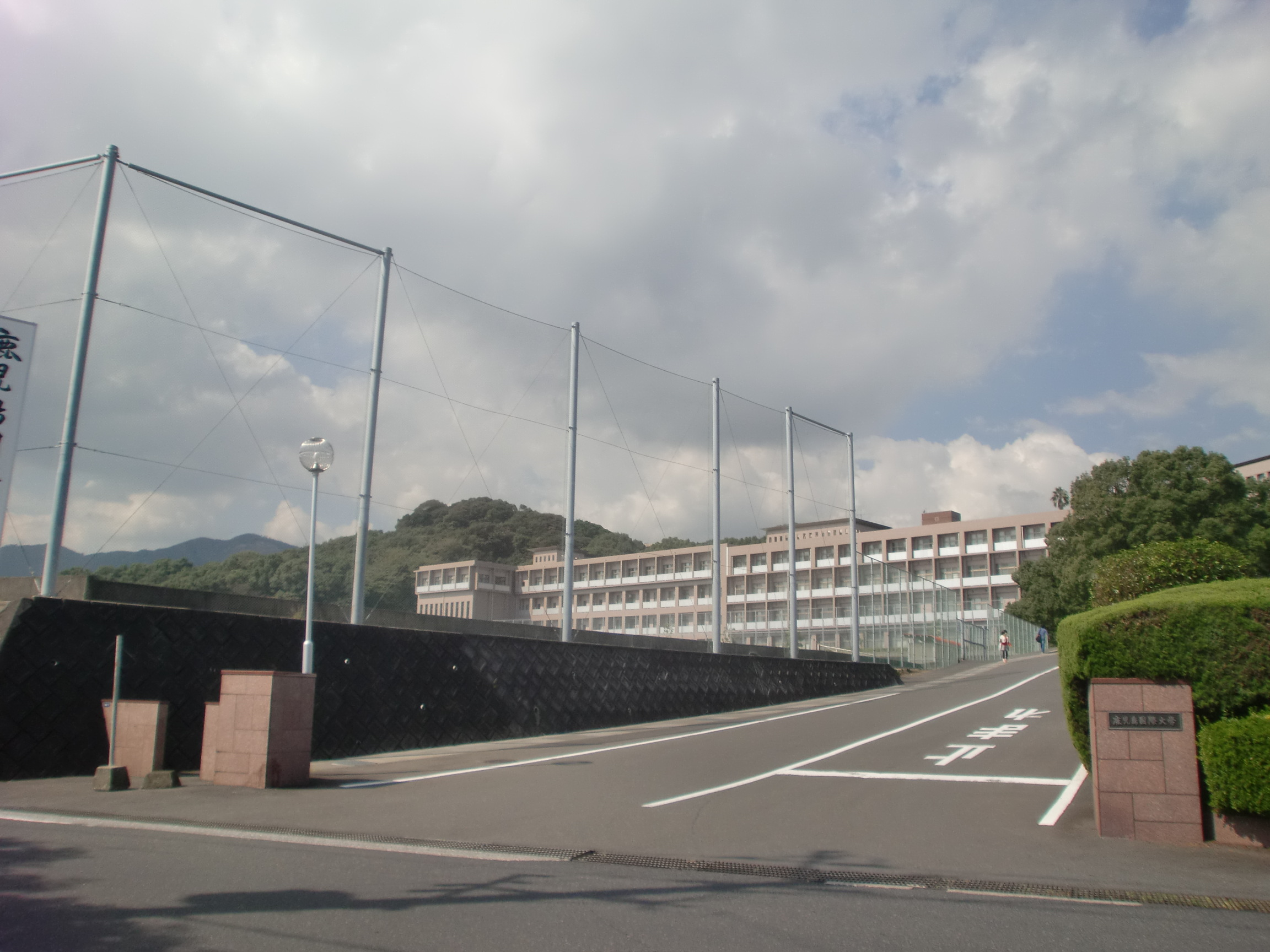 鹿児島国際大学の外観。